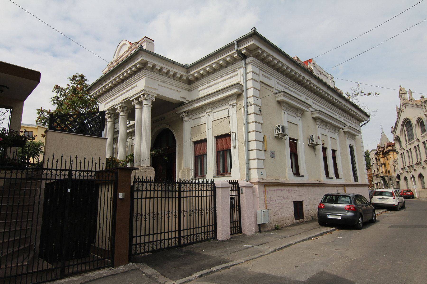 Casă pe Str Romulus